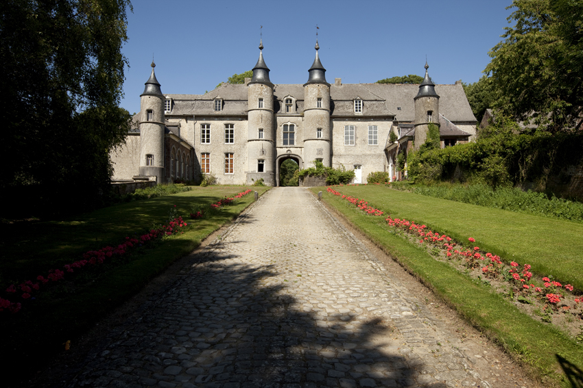 Le château de Houtain-le-Val